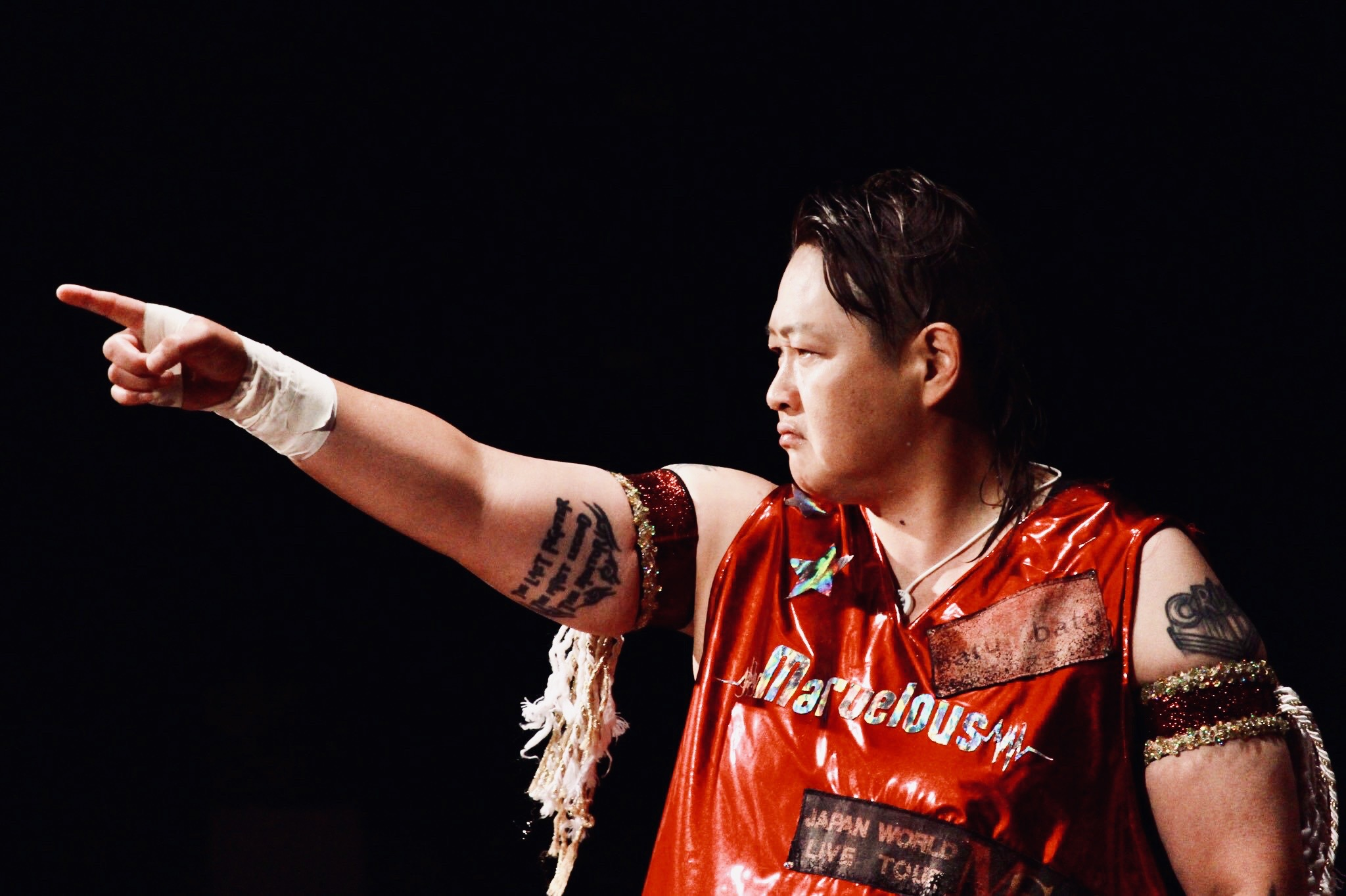 Marvelous 長与千種選手 撮影：yuzunet